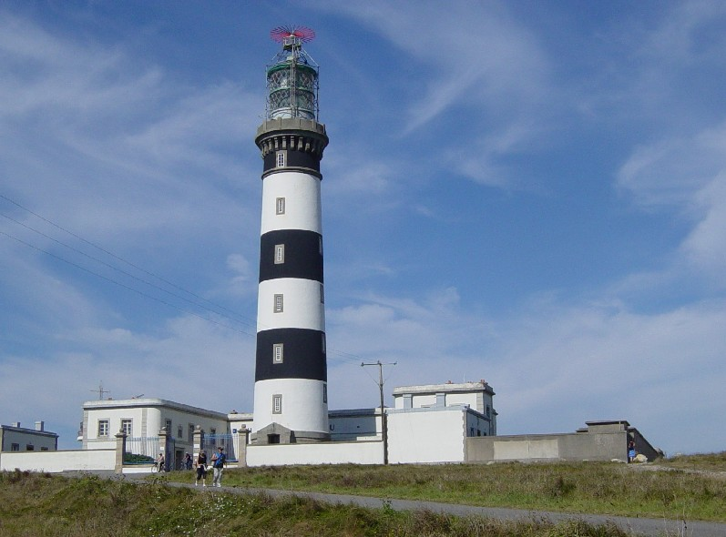 Phare de Créac'h